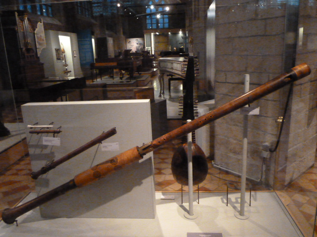 De enige nog bestaande contrabasblokfluit ter wereld. Ze is te bezichtigen in museum Vleeshuis te Antwerpen. Ze is 250 cm lang.